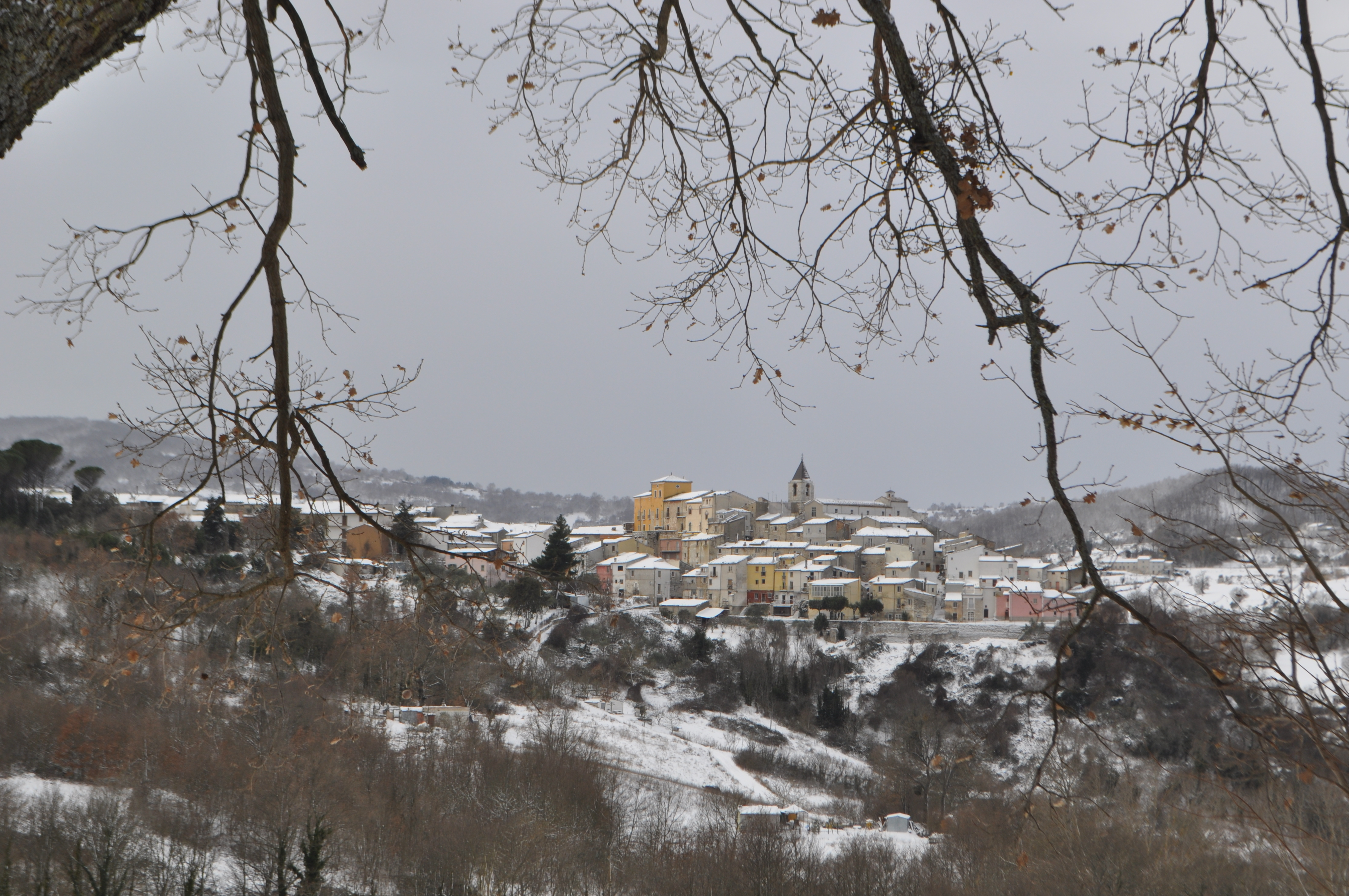 Paesaggio innevato